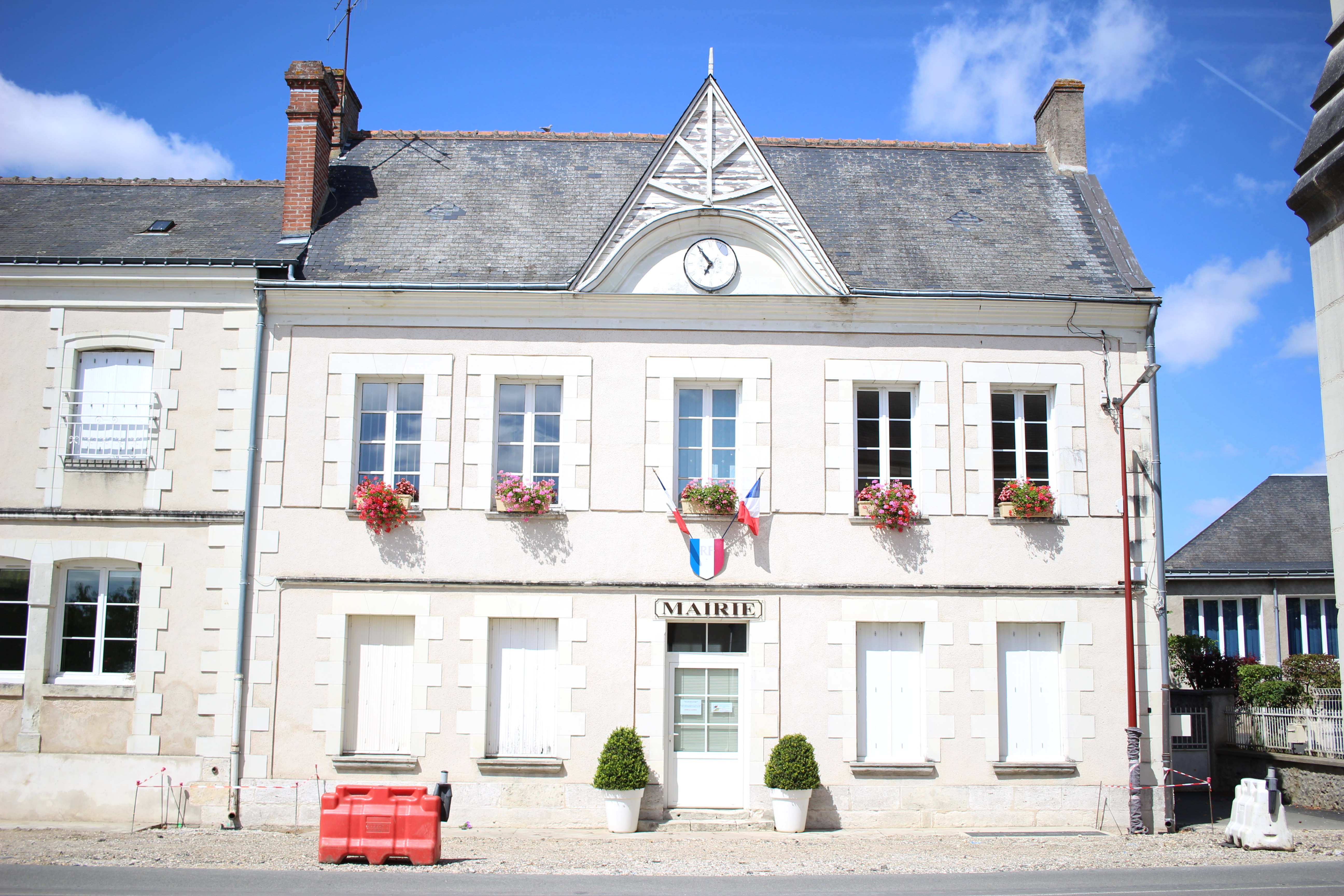 la Mairie de Montreuil-en-Touraine (France).